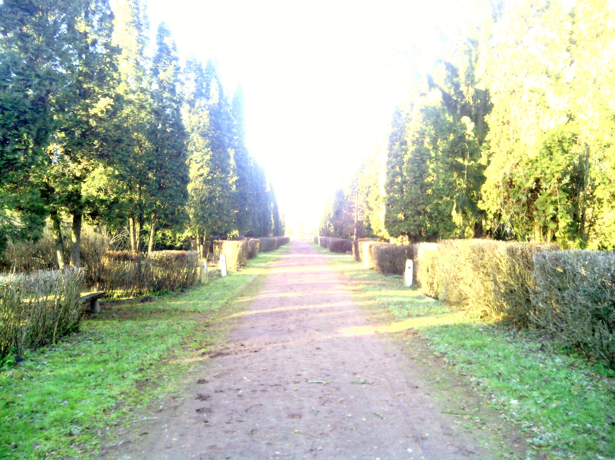 A Gyürky-Solymossy-kastély parkja, Kisterenye